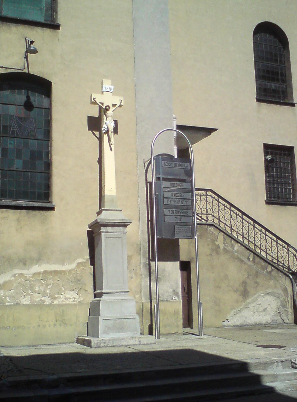 Pyskowice, ul. Poniatowskiego 10 - kościół parafialny pw. św. Mikołaja, widok od ulicy Koscielnej, info o mszach (zabytek nr A/289/60 z 7.03.1960)